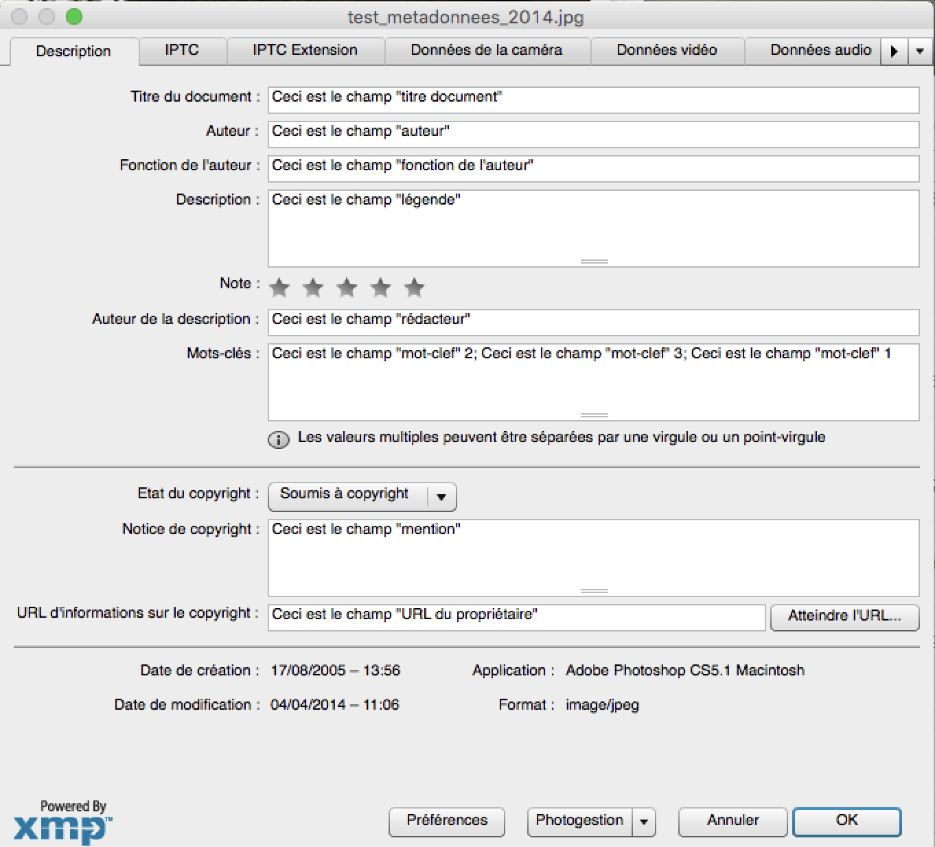 Fenêtre de saisie des métadonnées au sein de Adobe Photoshop CS. Test de correspondance des champs du schéma documentaire.